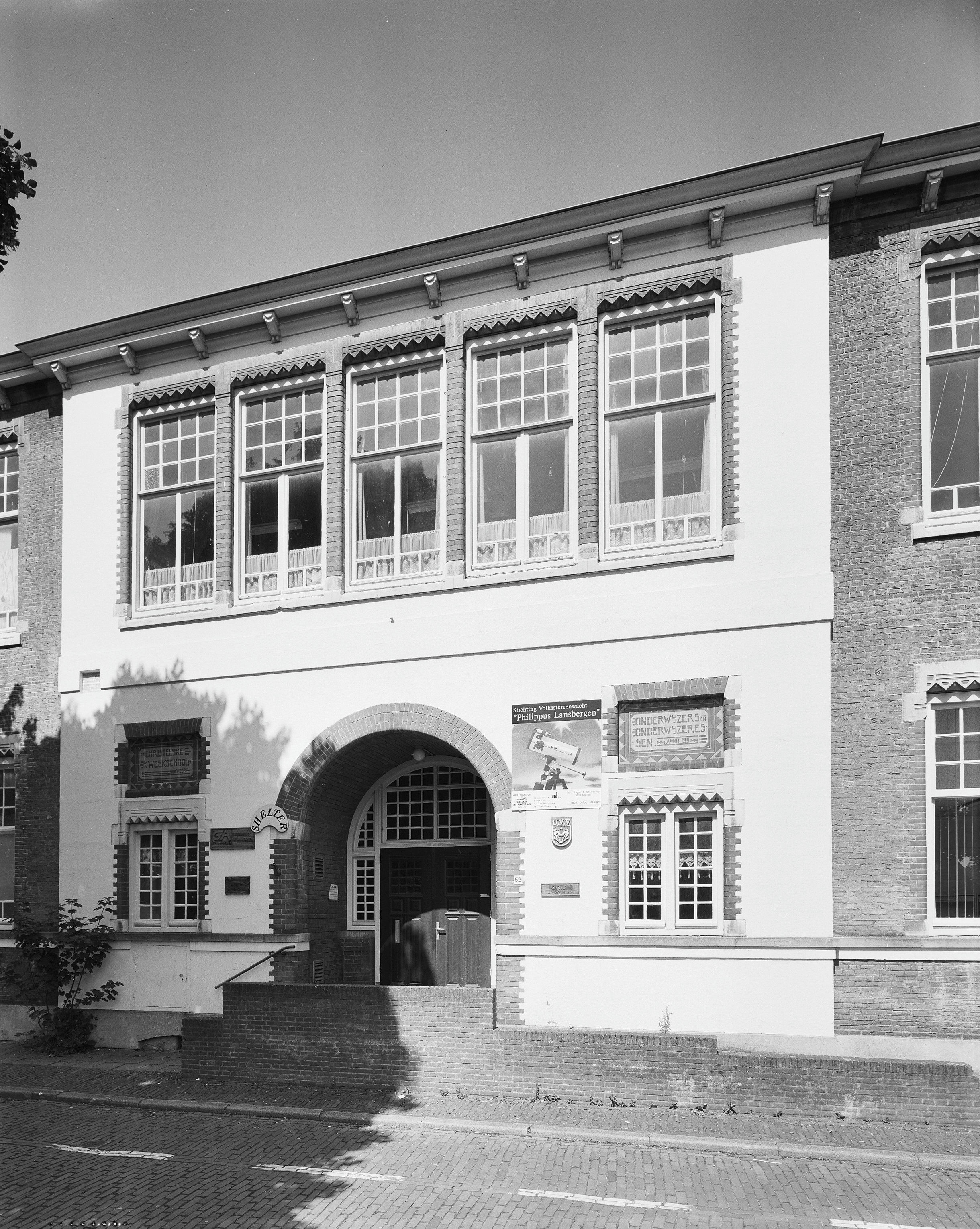 Voormalige Christelijke Kweekschool: Overzicht voorgevel (opmerking: Gefotografeerd voor Monumenten In Nederland Zeeland)